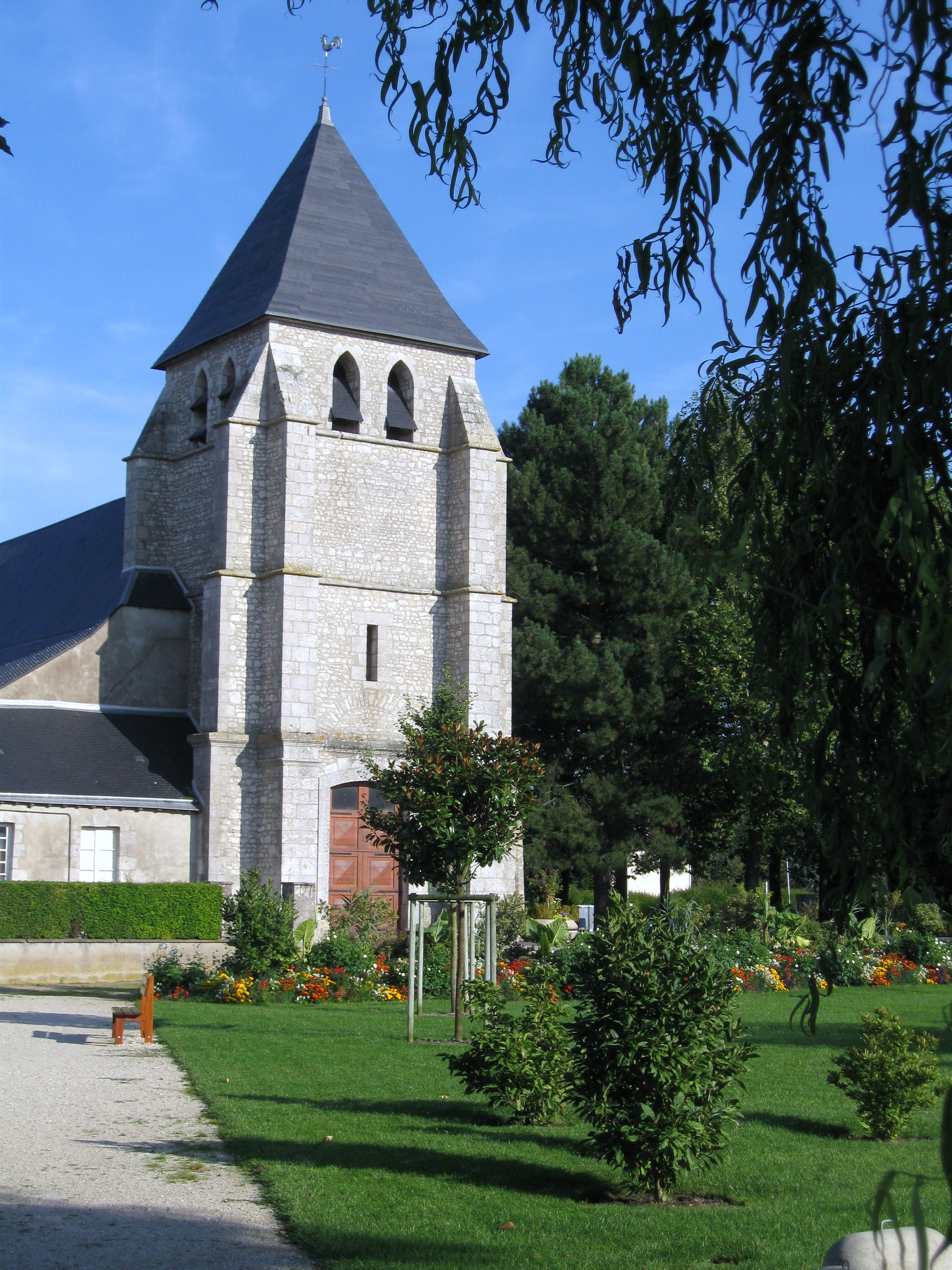 Église Saint-Martin, Saran, Loiret, France